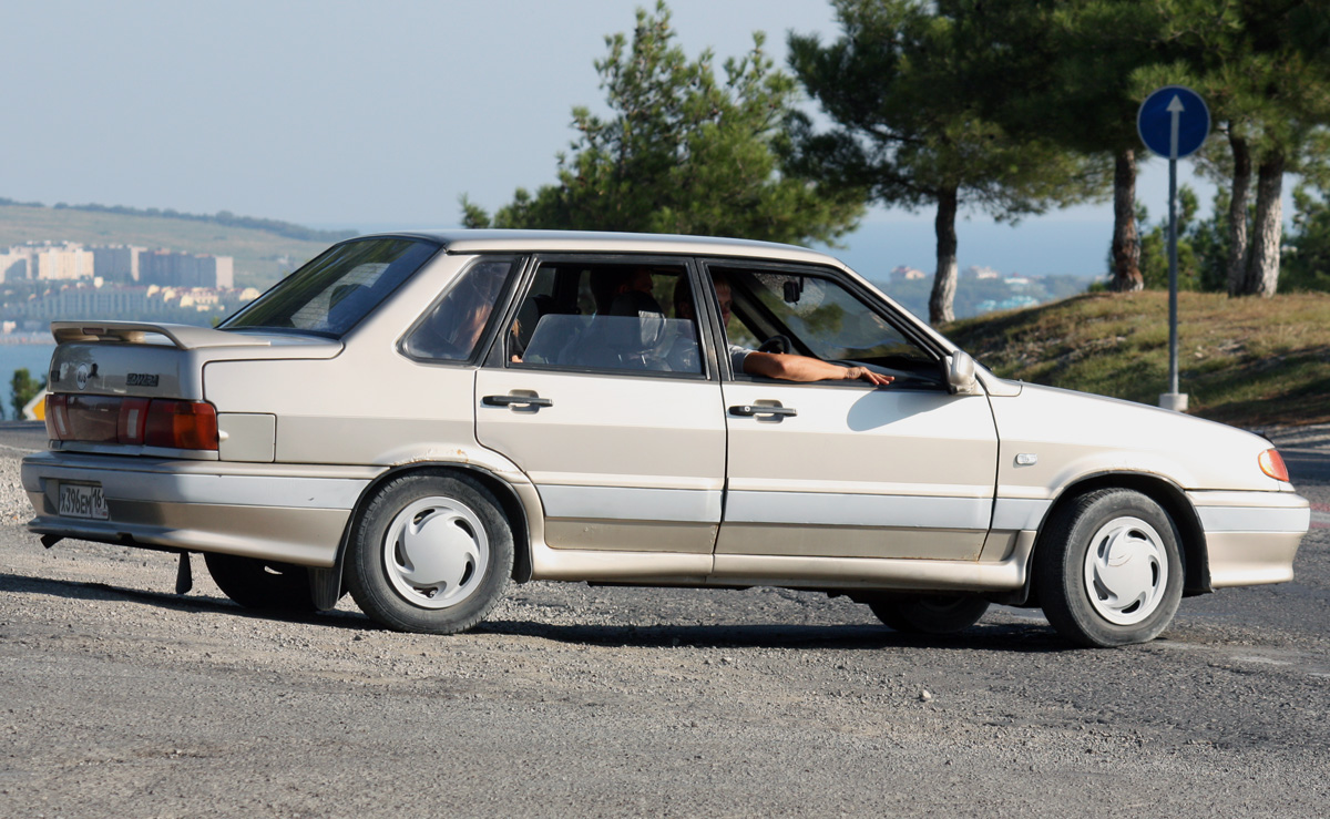 VAZ-2115 "Pyatnashka"